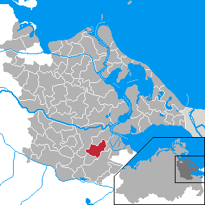 Neu Kosenow, Landkreis Ostvorpommern, Mecklenburg-Vorpommern